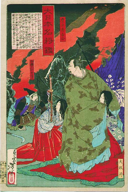 大日本名将鑑 豊臣秀吉公 1596年の慶長伏見地震の際に秀吉のもとに駆け付け救い出した加藤清正を描いたもの